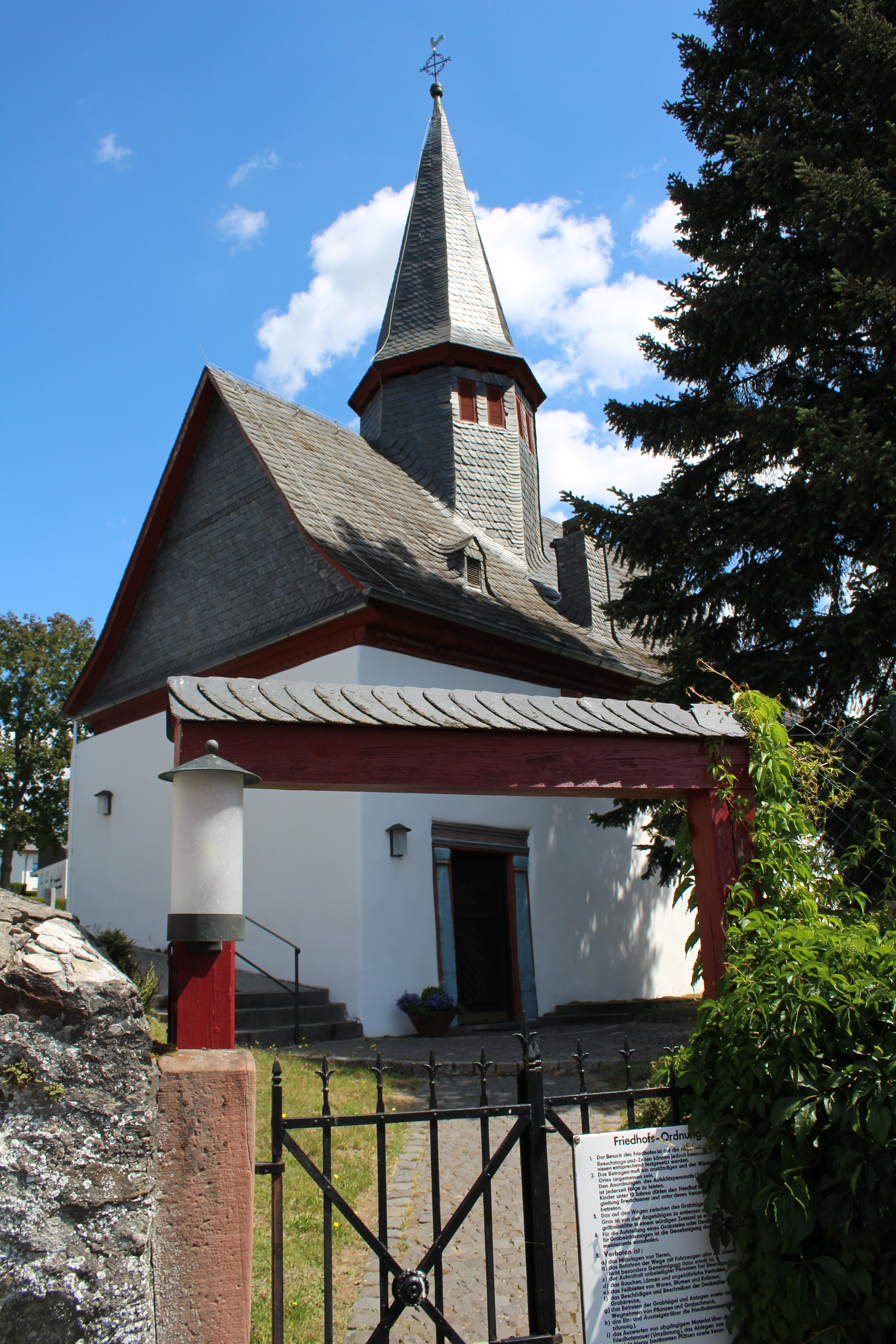 Evangelische Kirche Niederquembach, Gemeinde Schöffengrund, Hessen, Deutschland